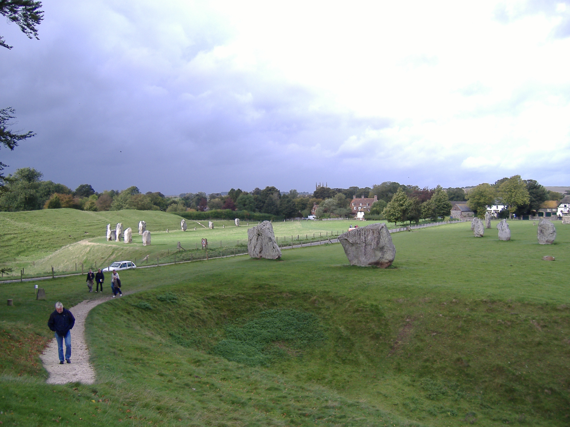 Avebury - Teil des äußeren Steinkreises, sowie rechts im Bild ein Teil eines inneren Steinkreises